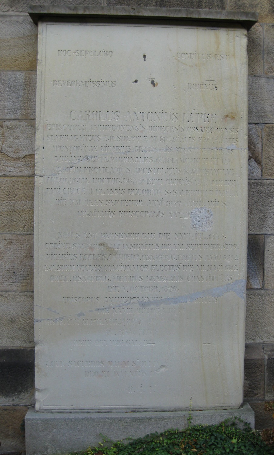 Grabstein des Osnabrücker Bischofs Carl Anton Lüpke auf dem Domherrenfriedhof des Osnabrücker Doms St. Peter